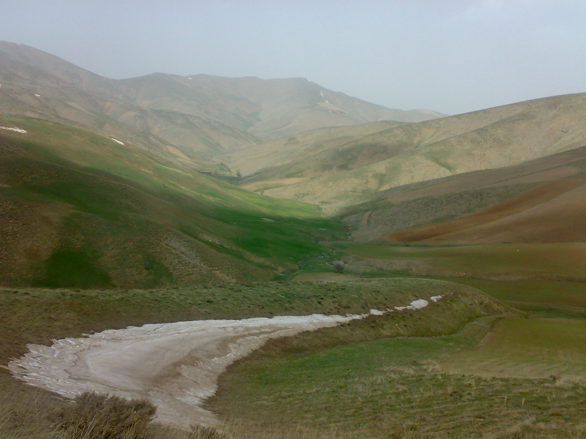 باراوا مزرعه سرسبز هلالاوی در فاصله 3 کیلومتری روستای بهرام آباد